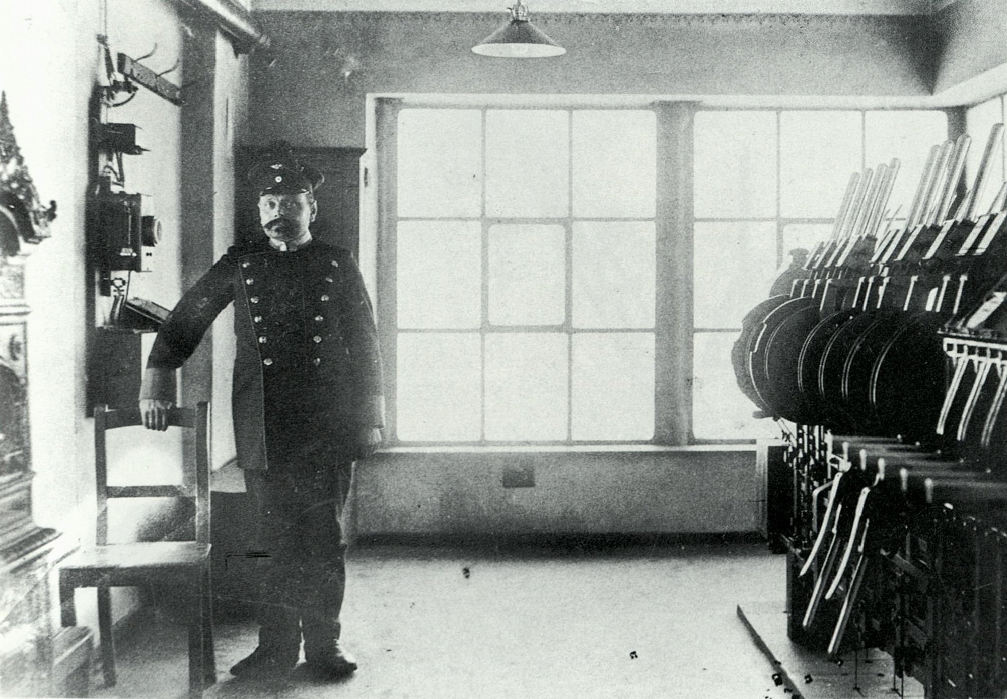 Weichenwärter auf einem Wärterstellwerk der Bauart Krauß im Bahnhof Schwaben (heute Markt Schwaben)